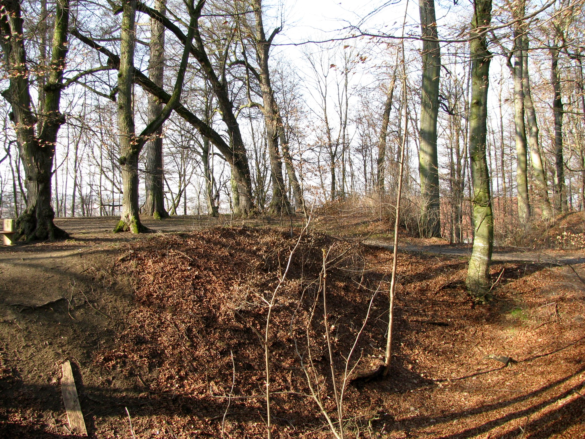 Burgstall Engelsberg, Graben südostseitig